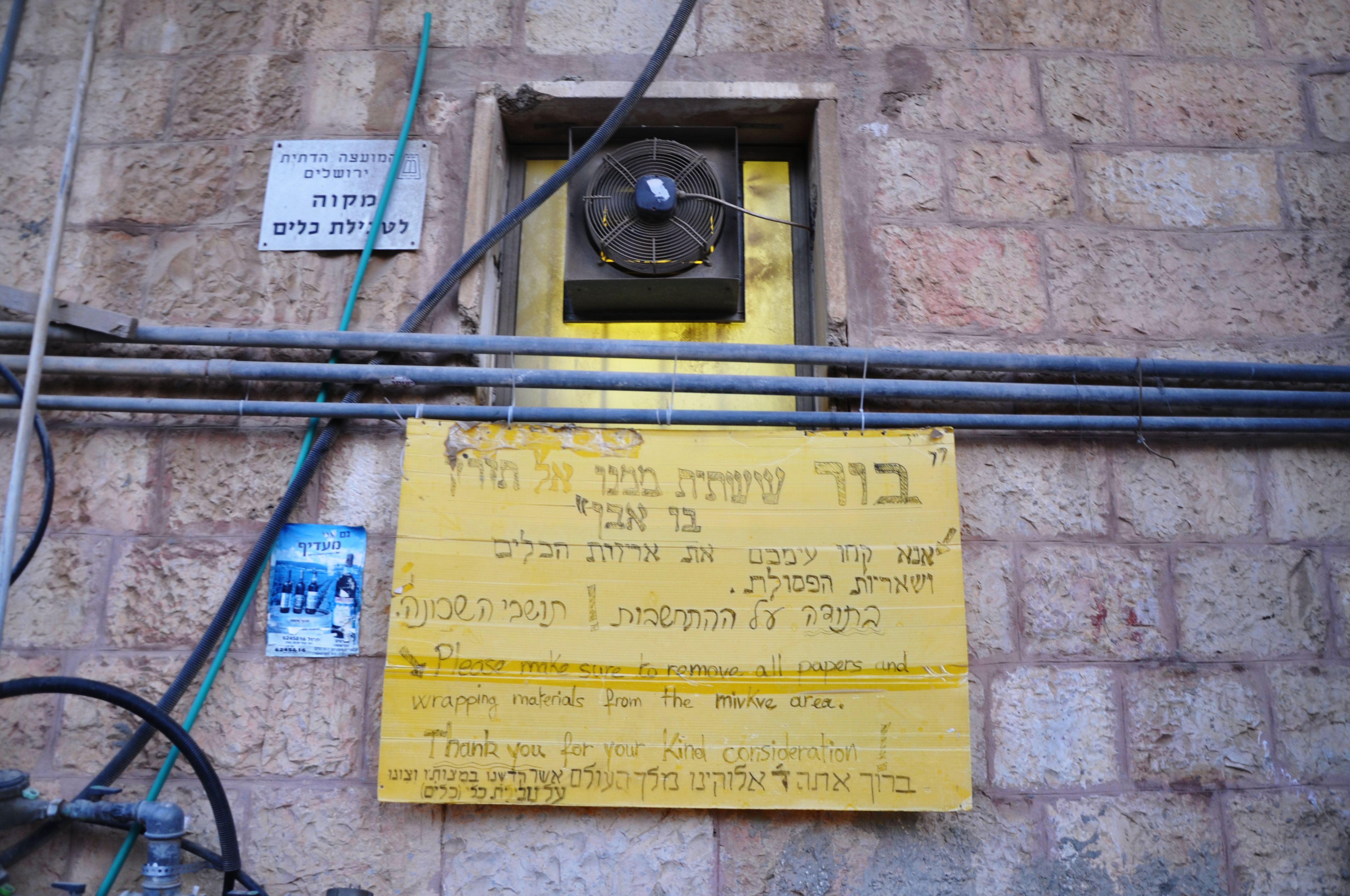 בתי ראנד היא שכונת חצר בירושלים, בין רחוב בצלאל לבין שכונת מחנה יהודה. נקראת על שם מייסדה, מנחם מנדל הכהן ראנד. בשכונה בתים שיתופיים בני שתי קומות, עם אלמנטים פיסוליים רבים, הבנויים מסביב לחצרות פנימיות.